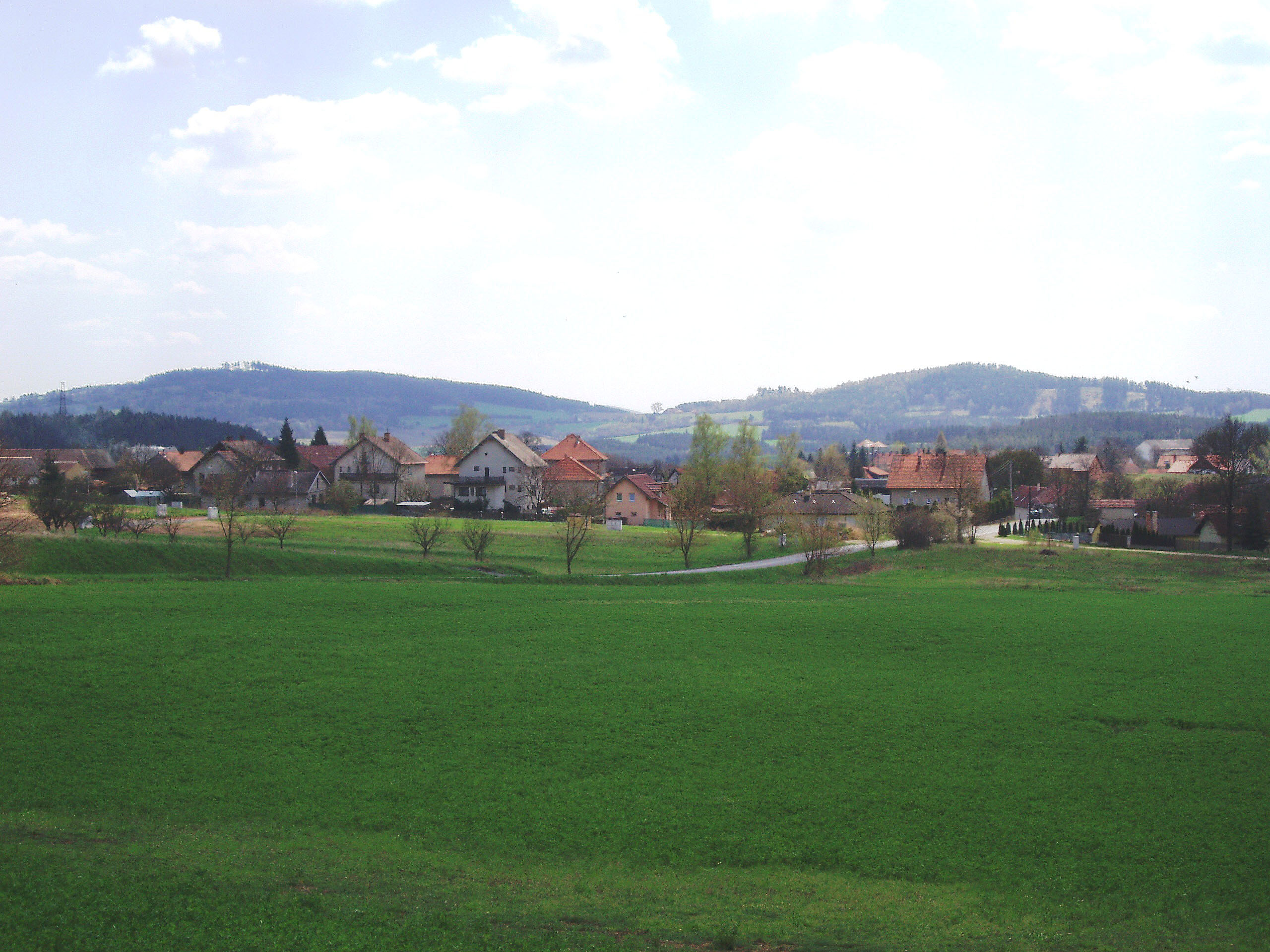 Jelence - celkový pohled